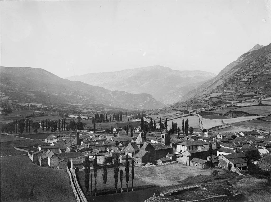 Imatge